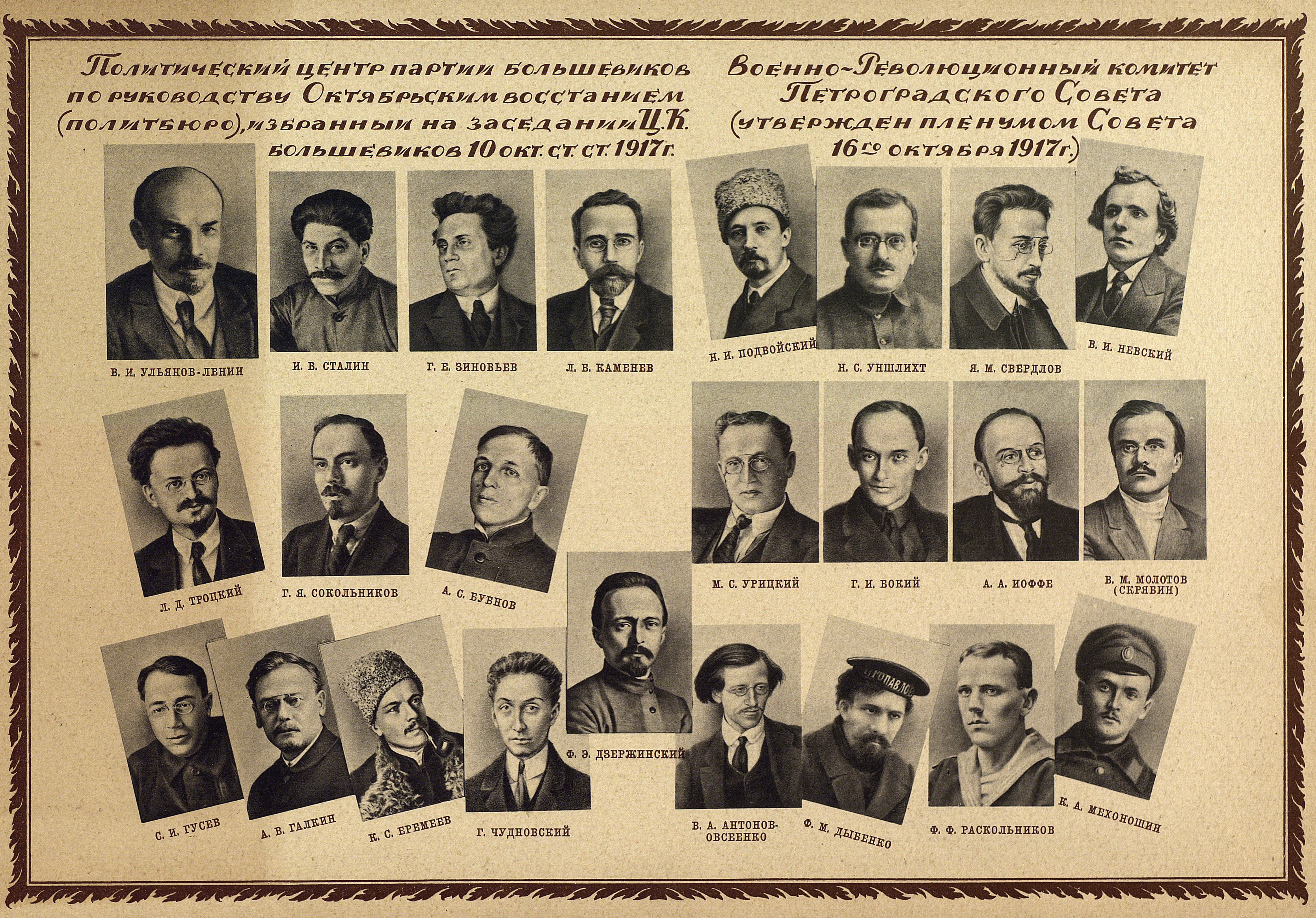 Члены ВРК Петросовета, руководившего Октябрьским переворотом 1917 года